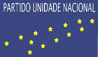 Flag of East Timorese party Partido Unidade Nacional PUN